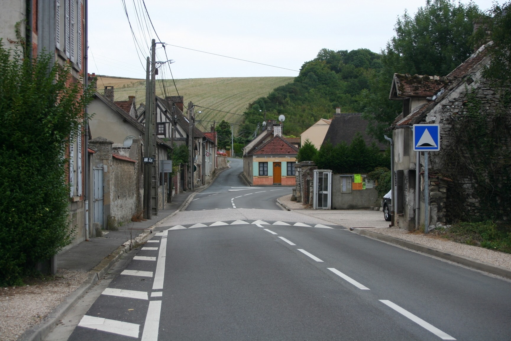 Le hameau de Roconval, commune d'Amenucourt - Val-d'Oise, France